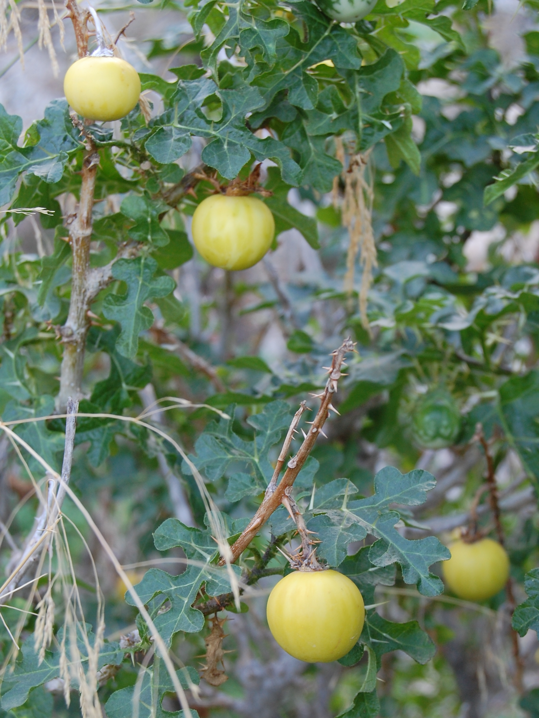 Solanun sodomaeum (= Solanum linnaeanum) Riserva naturale Capo Gallo, Palermo, Sicily